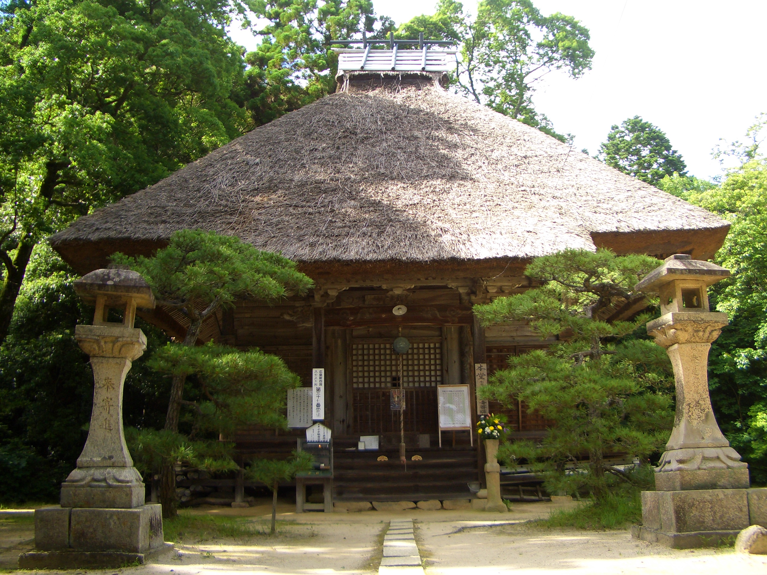 並滝寺の写真